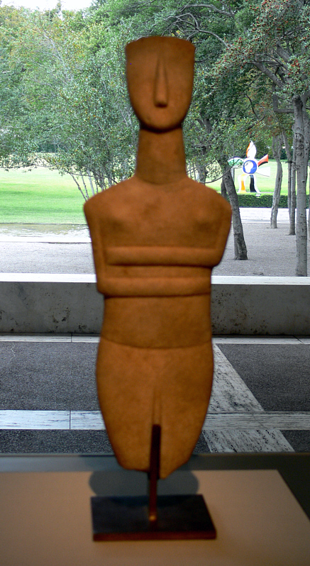 Female Figure